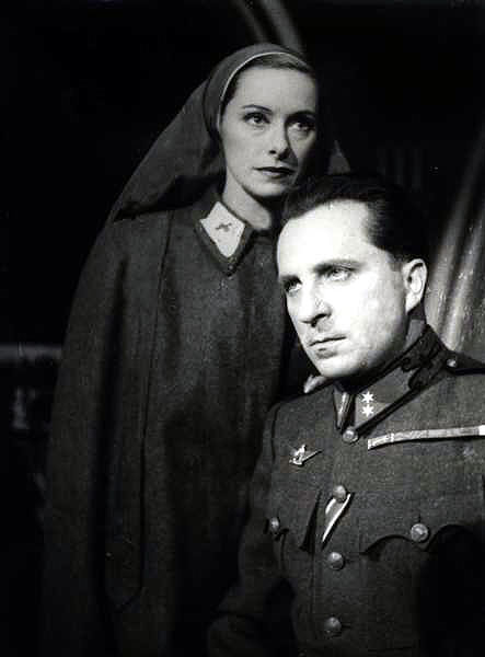 Vaszary János: Egy nap a világ. Andrássy Színház, 1942. Muráti Lili (Mária) és Páger Antal (Tamás).